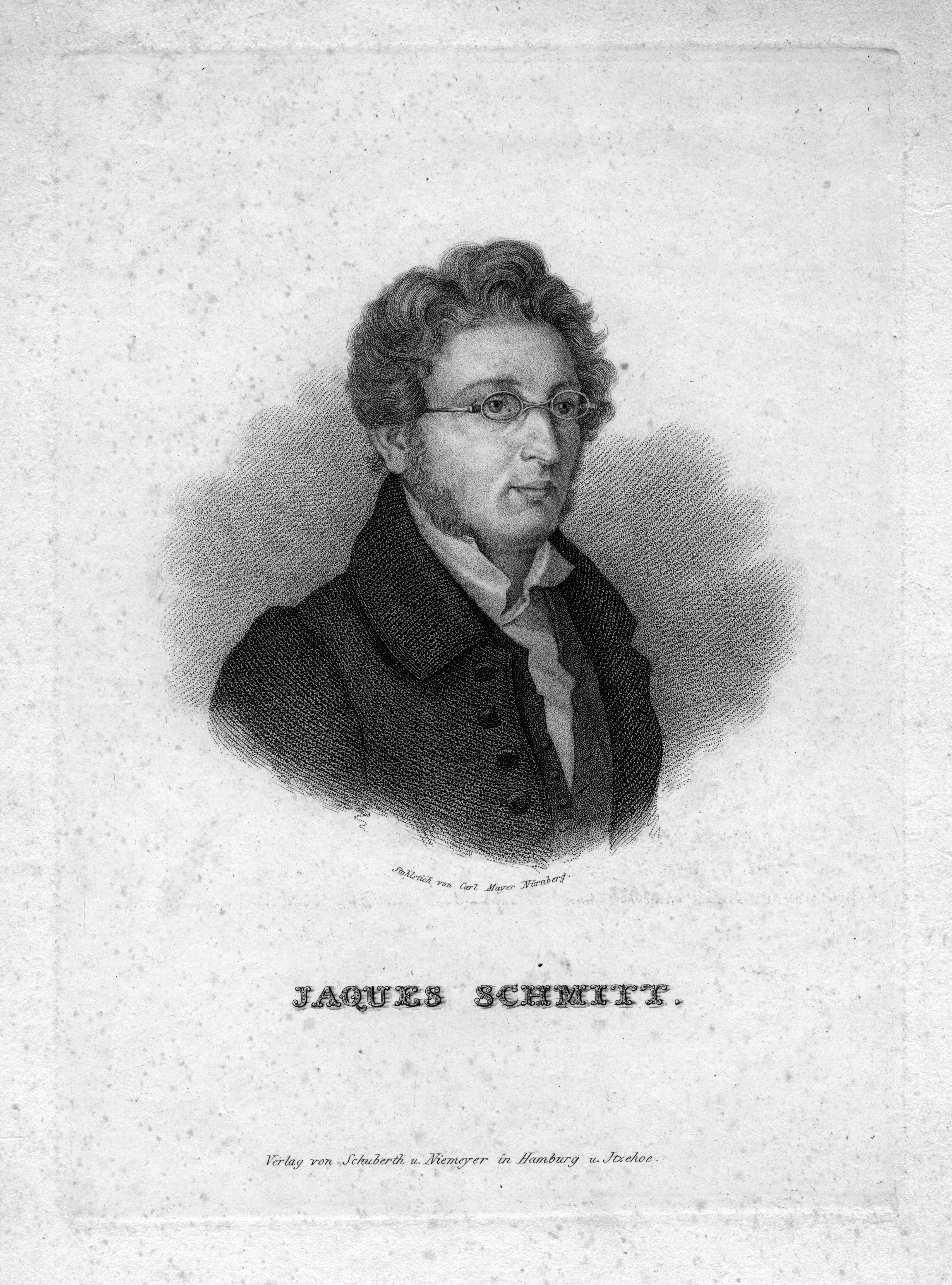 portrait gravé